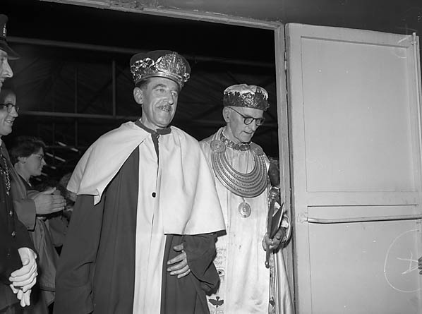 National Eisteddfod of Wales Teitl Cymraeg/Welsh title: Eisteddfod Genedlaethol Cymru, Glynebwy, 1958 : D. Llewelyn Jones o Lanbadarn Fawr, enillydd y goron, a'r Archdderwydd, William Morris. Ffotograffydd/Photographer: Geoff Charles (1909-2002) Dyddiad/Date: August 4, 1958. Cyfrwng/Medium: Negydd ffilm / Film negative Cyfeiriad/Reference: (gch16583) Rhif cofnod / Record no.: 3370788 Rhagor o wybodaeth am gasgliad Geoff Charles yn Llyfrgell Genedlaethol Cymru More information about the Geoff Charles Collection at the National Library of Wales